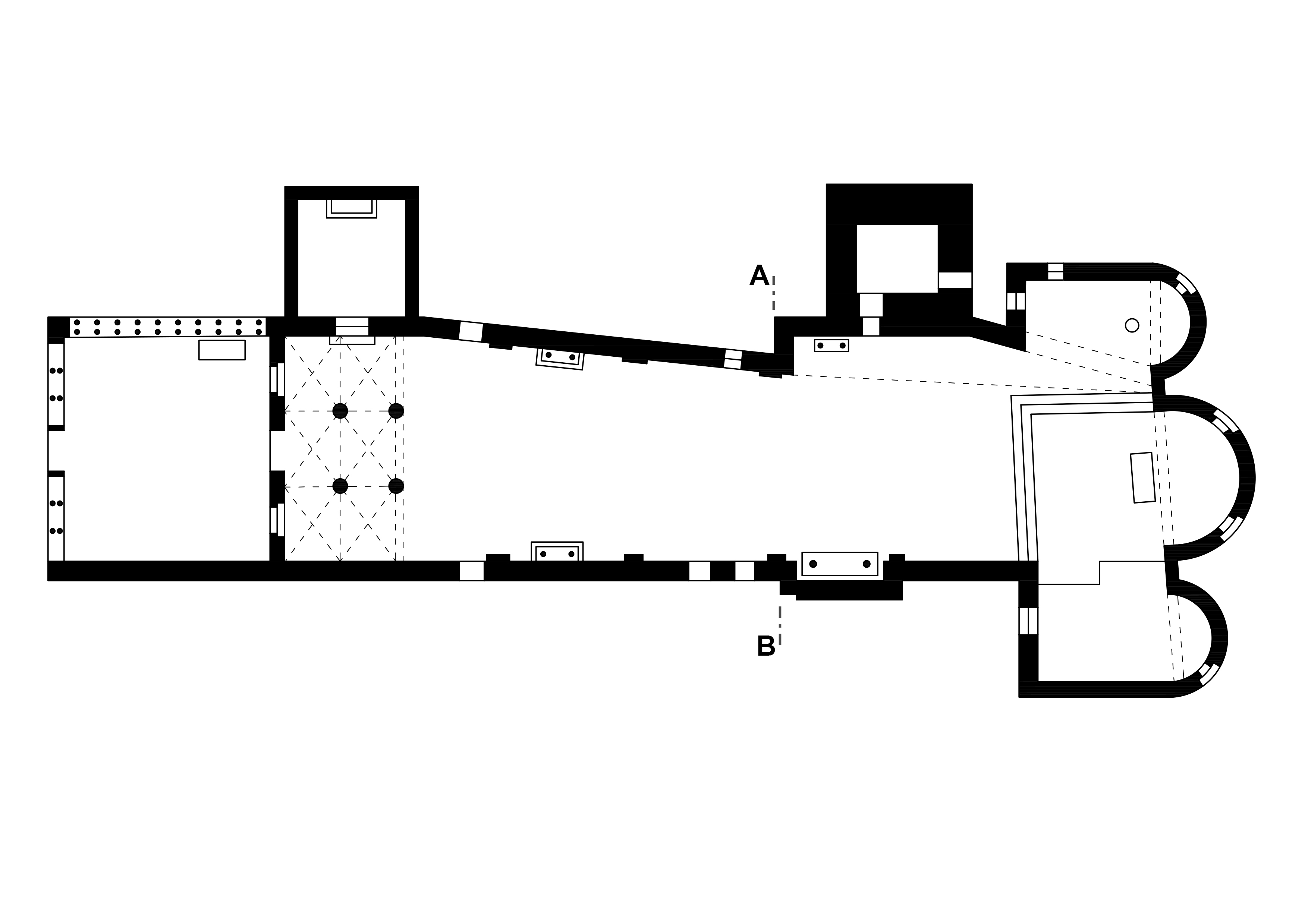 Planimetria ridisegnata del piano terra della Chiesa